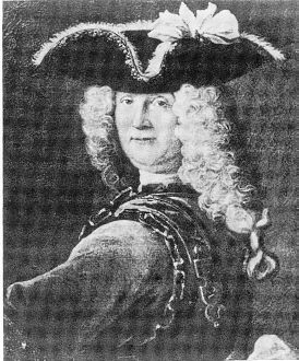 Portrait de Marc-Antoine de Saint-Pol Hécourt